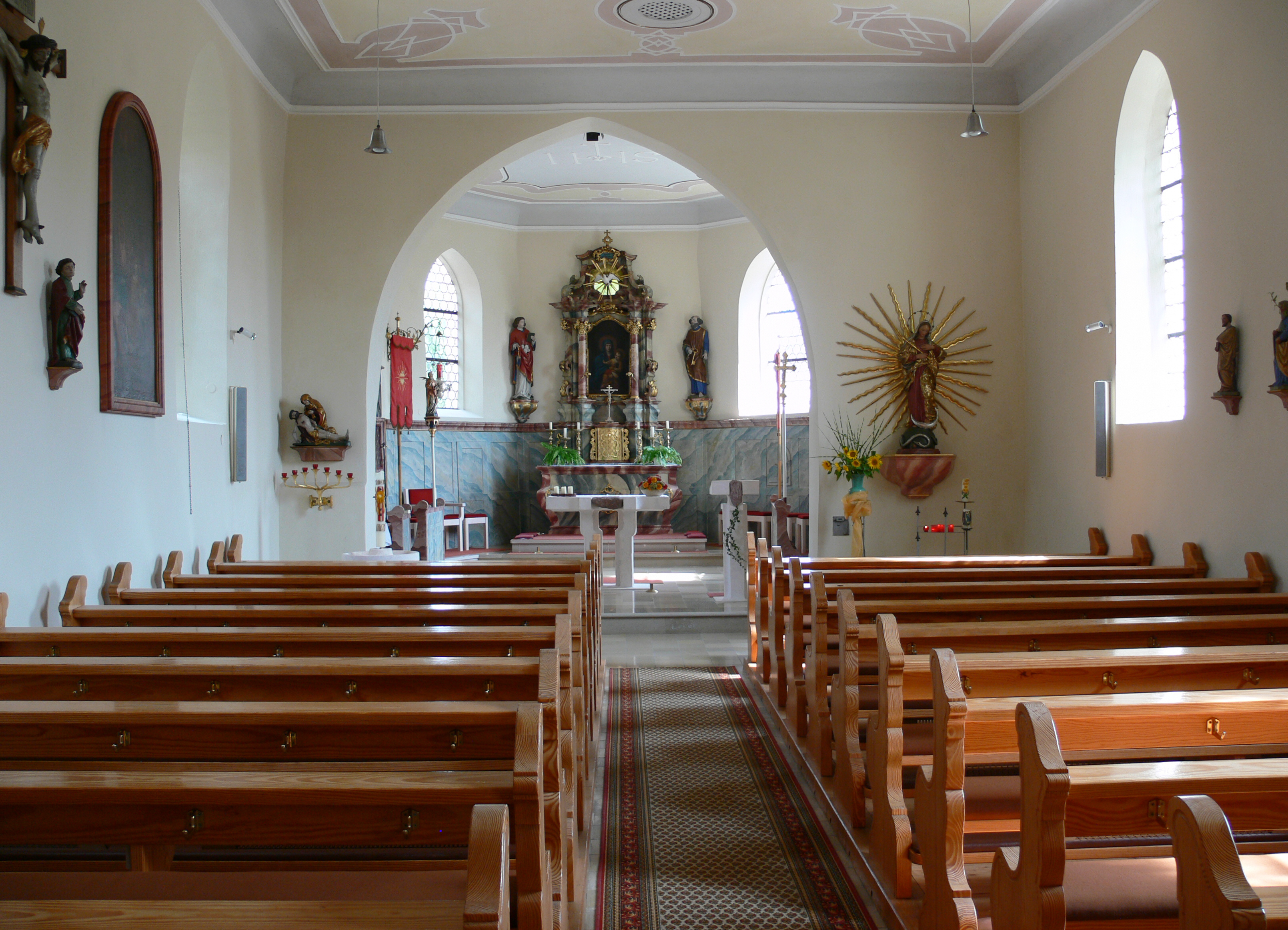 Katholische Pfarrkirche St. Stephanus, Ringgenweiler, Gemeinde Horgenzell, Landkreis Ravensburg Blick zum Chor